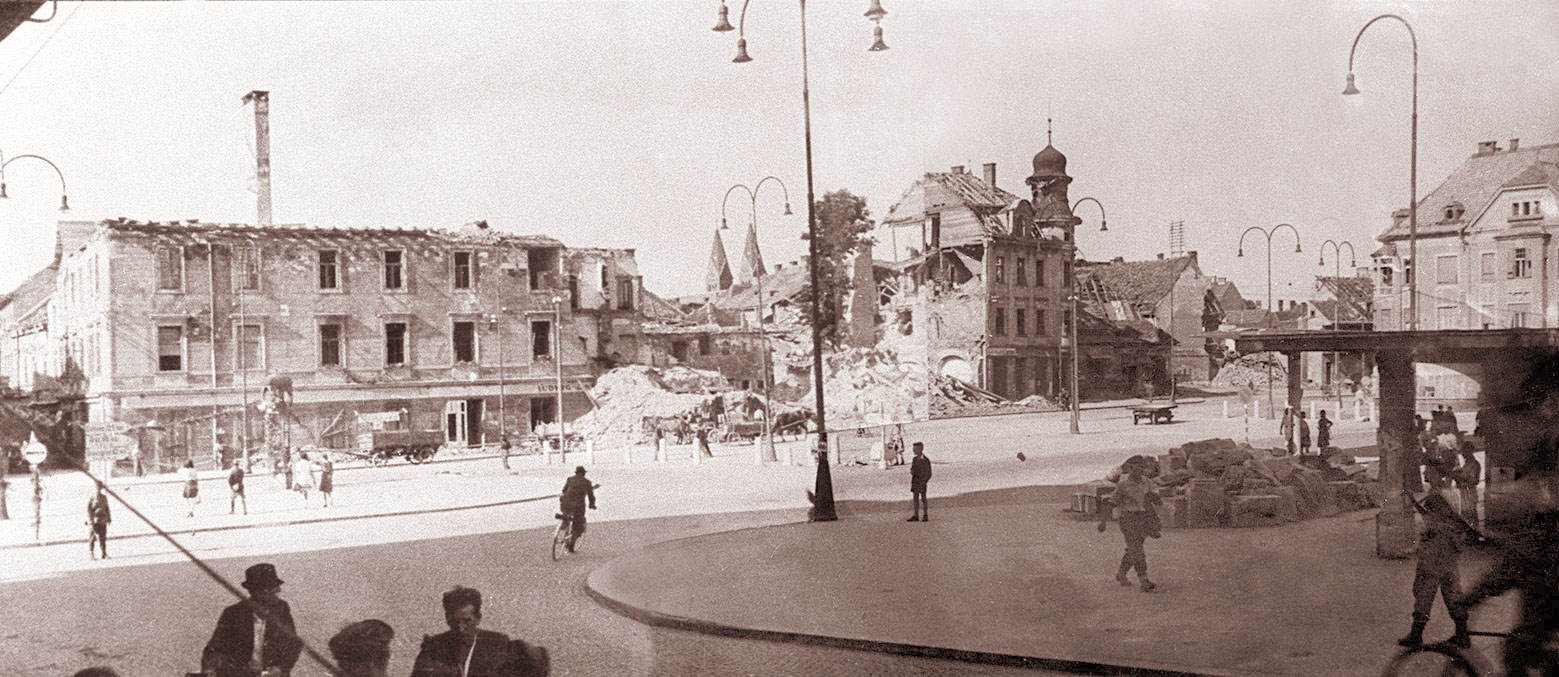 Reprodukcija fotografije - Glavni trg v Mariboru ob osvoboditvi